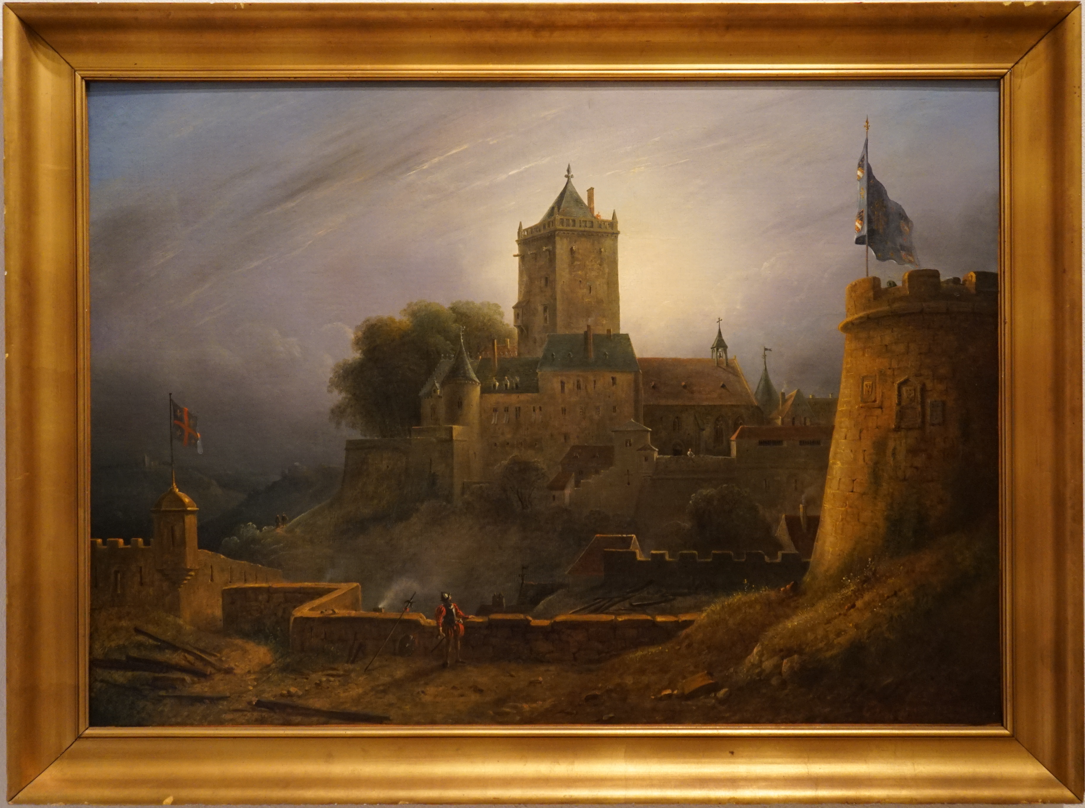 présenté au musée de Chaumont.